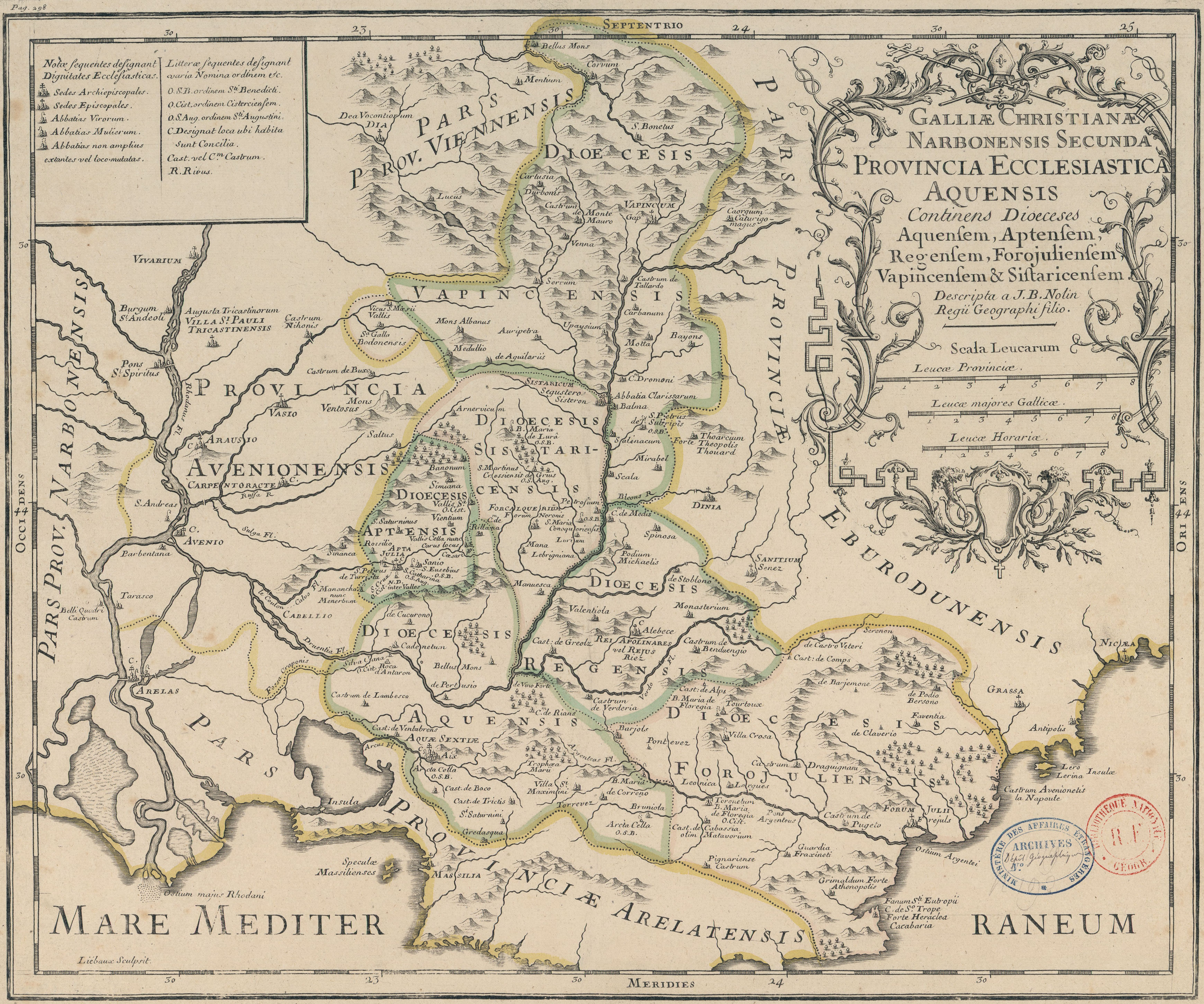 Carte de l'ancienne province ecclésiastique d'Aix, insérée dans le Tome 1 de la Gallia Christiana (1715).